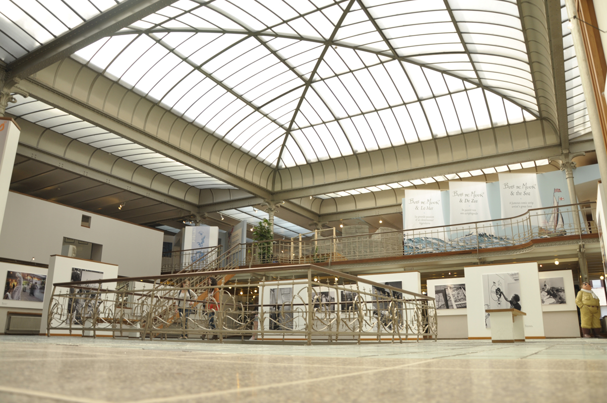 Vue du 2e étage du Centre belge de la bande des